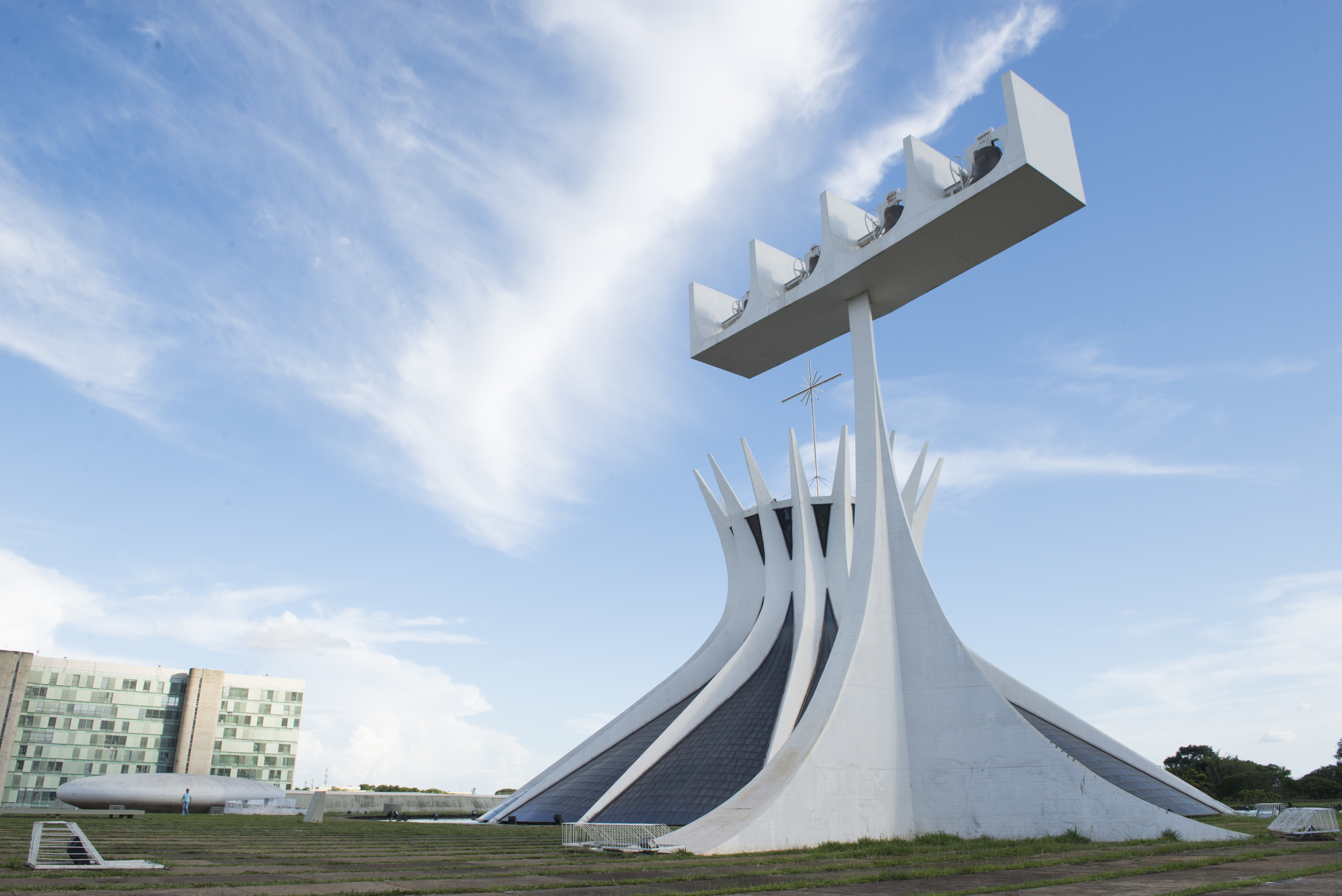 Catedral Metropolitana de Nossa Senhora Aparecida, mais conhecida como Catedral de Brasília, é a catedral católica que serve a Brasília, Brasil, e é a sede da Arquidiocese de Brasília. Fonte: Wikipédia Foto: Leonardo Sá/Agência Senado